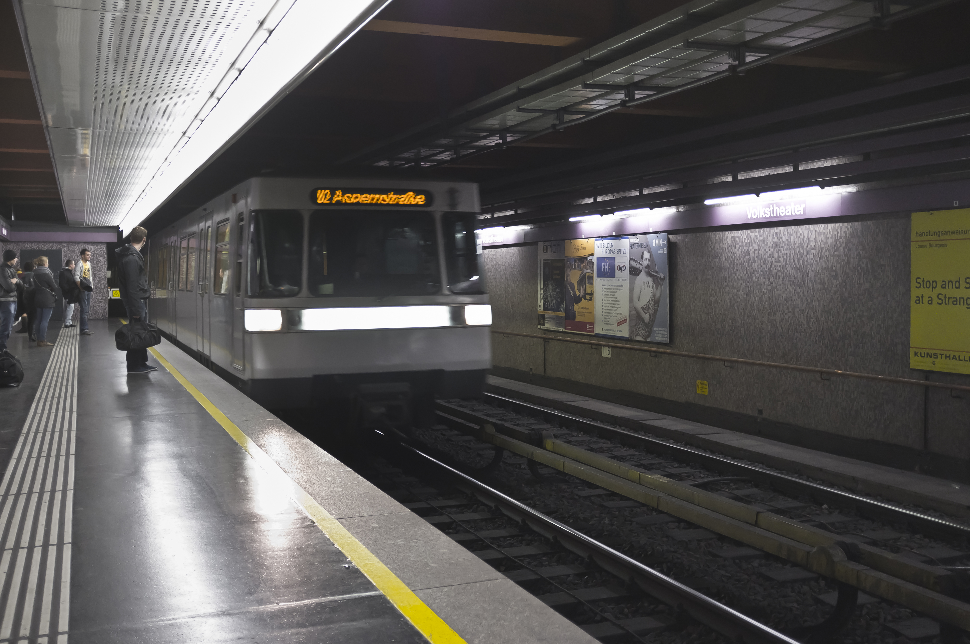 Vienna, AT